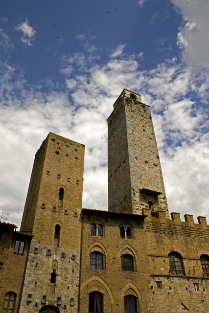 Torri di San Gimignano